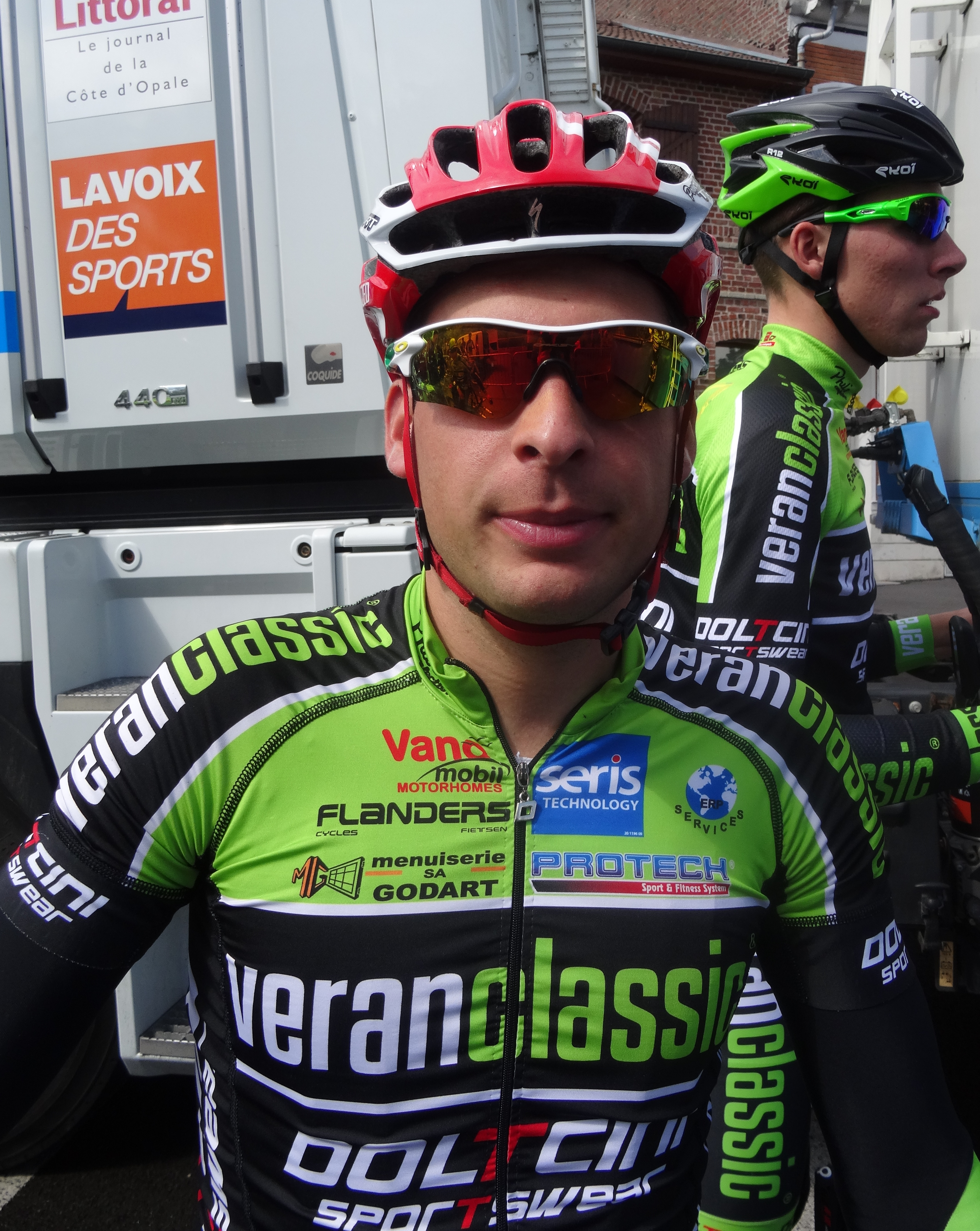 Reportage photographique réalisé le vendredi 23 mai 2014 à l'occasion du départ de la première étape du Paris-Arras Tour 2014 à Lens, Pas-de-Calais, Nord-Pas-de-Calais, France. Depicted people: Sascha Weber and Bob Schoonbroodt Depicted team: Veranclassic-Doltcini